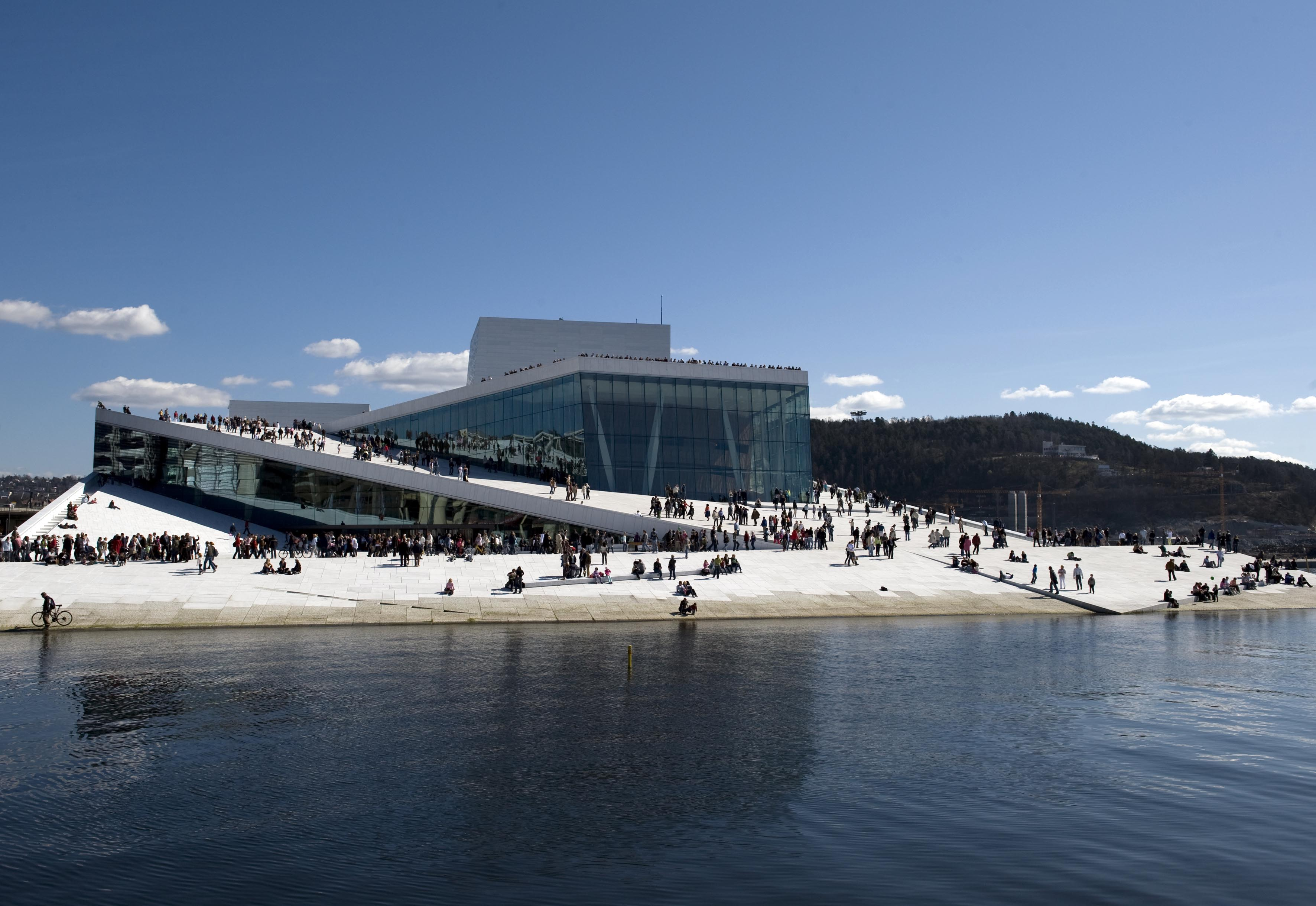 Det nye området rundt operaen i Oslo er et eksempel på stedsskaping.